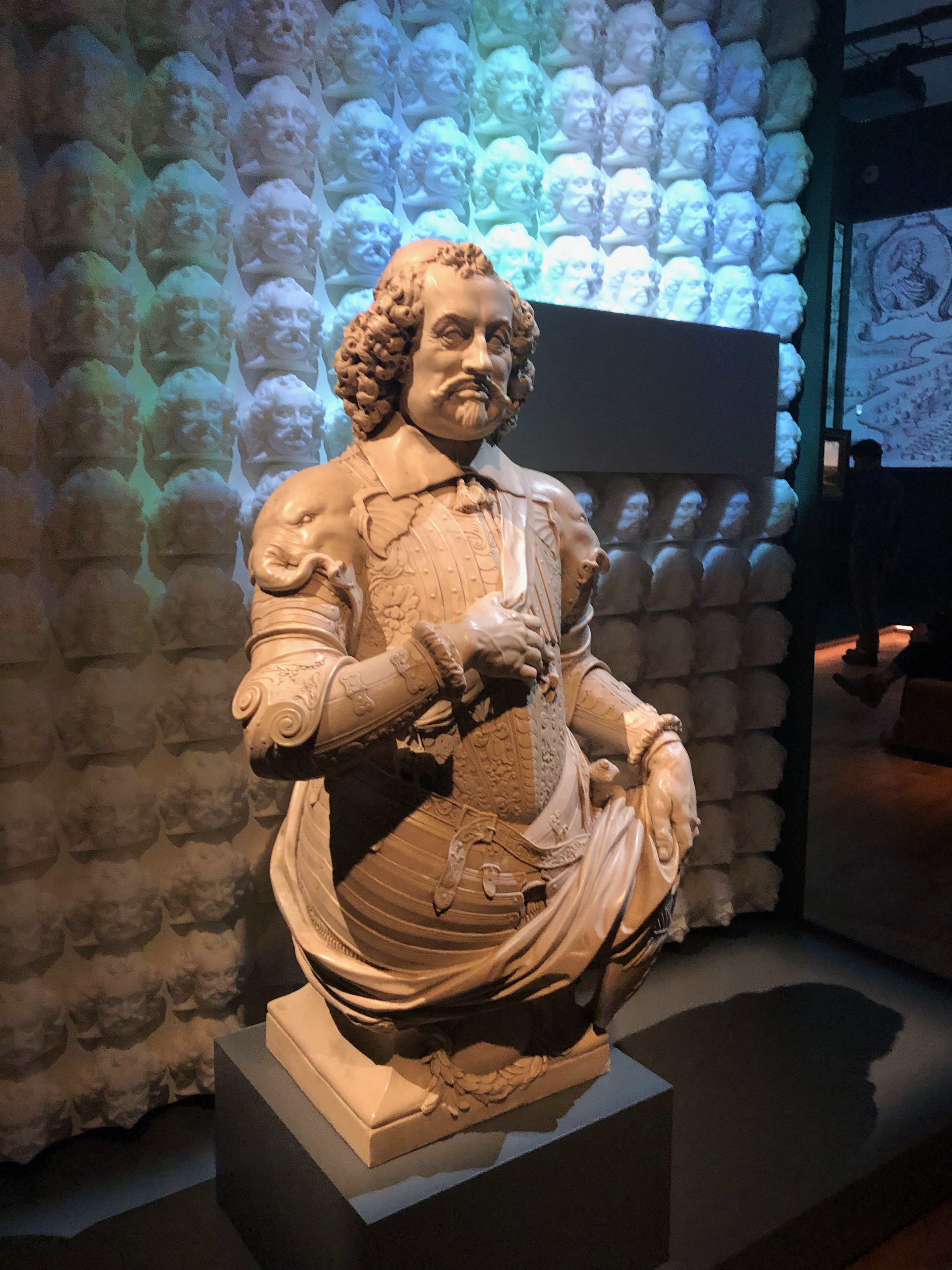 tentoonstelling Bewogen Beelden in het Mauritshuis